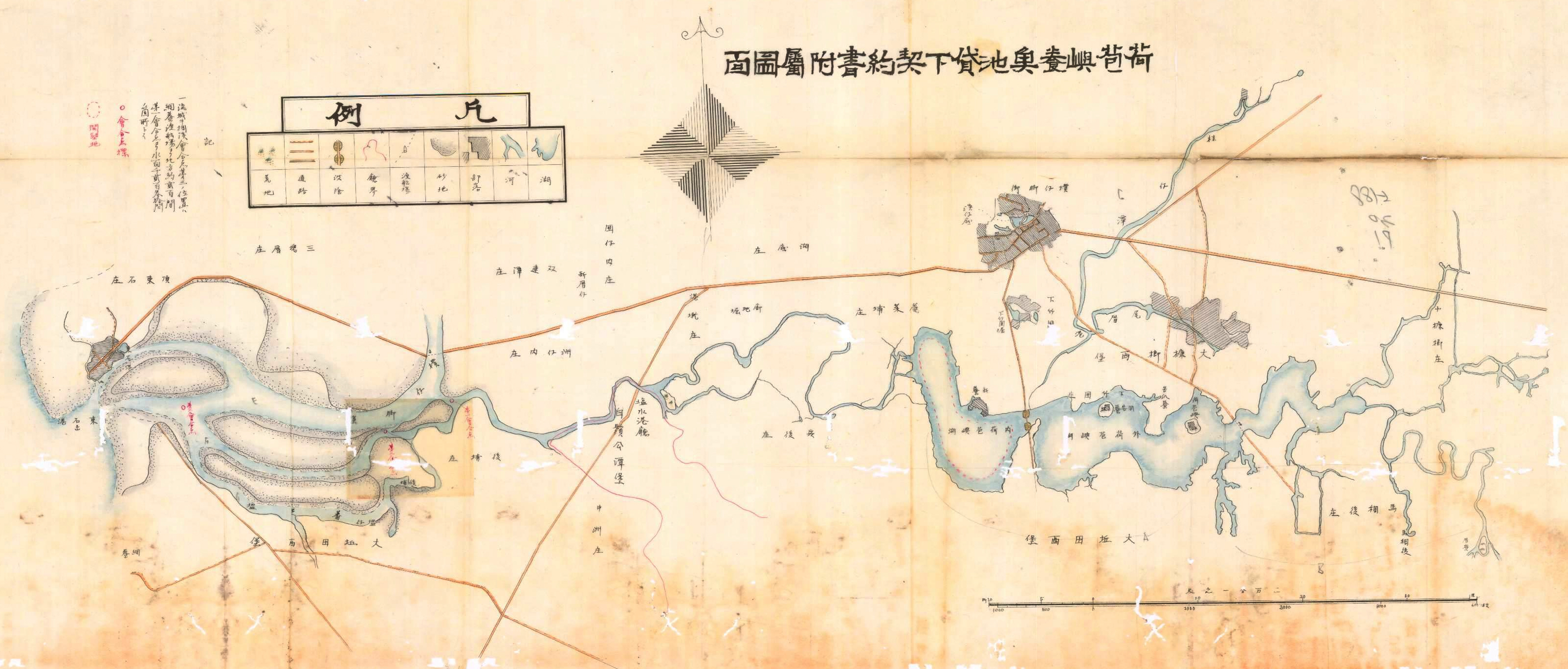 荷苞嶼為嘉義縣朴子市區南側的一處湖泊